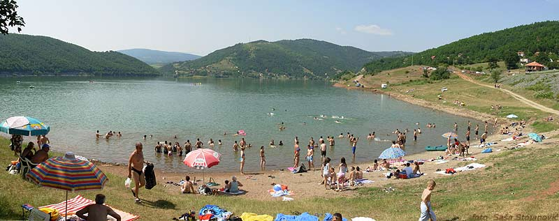 Бованско језеро, вештачка је акумулација. Намена му је да задржи муљ који река Моравица носи са собом. Вода из језера отиче као Моравица још 12 км до ушћа у Јужну Мораву. Licensing